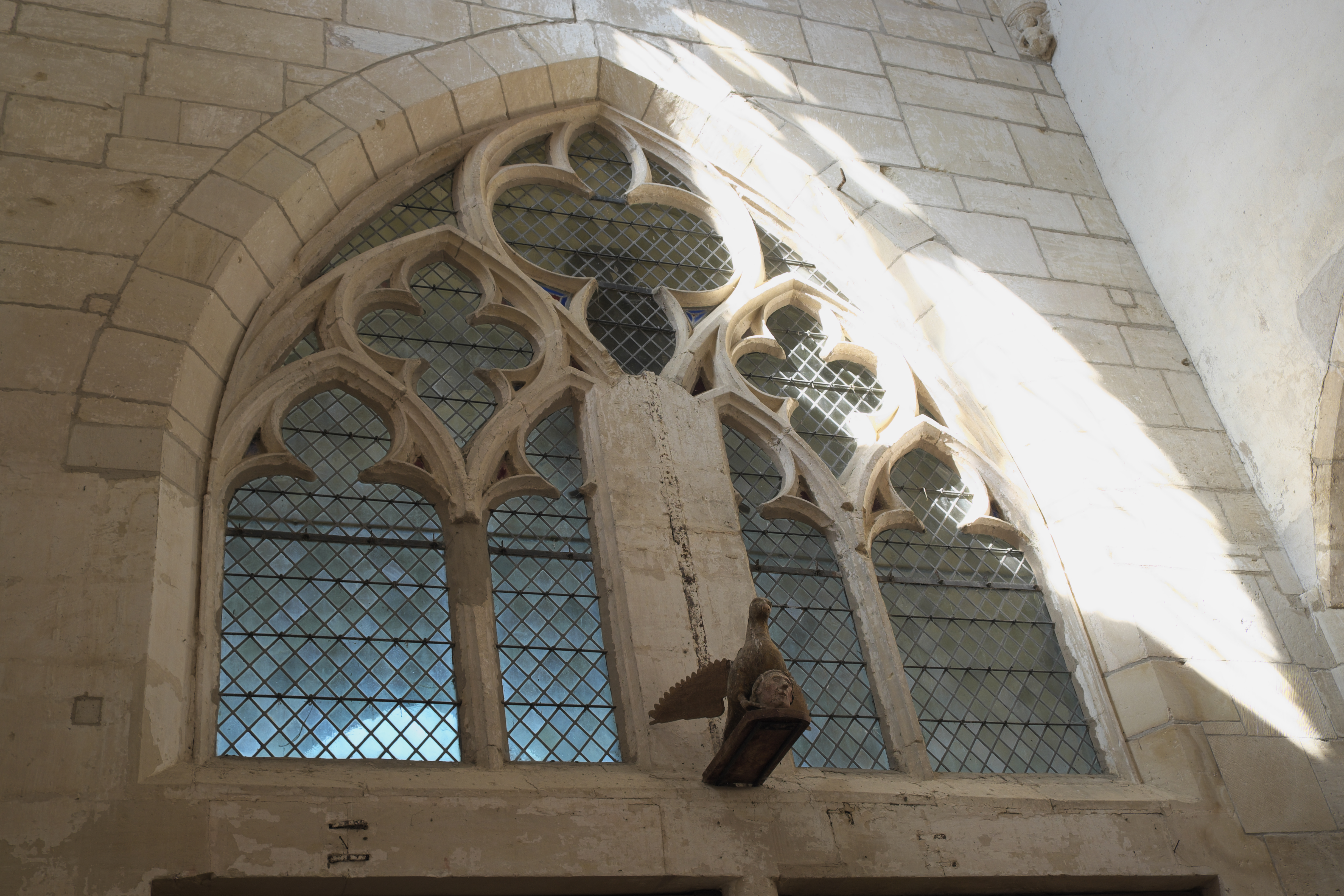 Katholische Kirche Saint-Louvent in Rembercourt-Sommaisne im Département Meuse (Lothringen) (Region Grand Est/Frankreich), Innenraum